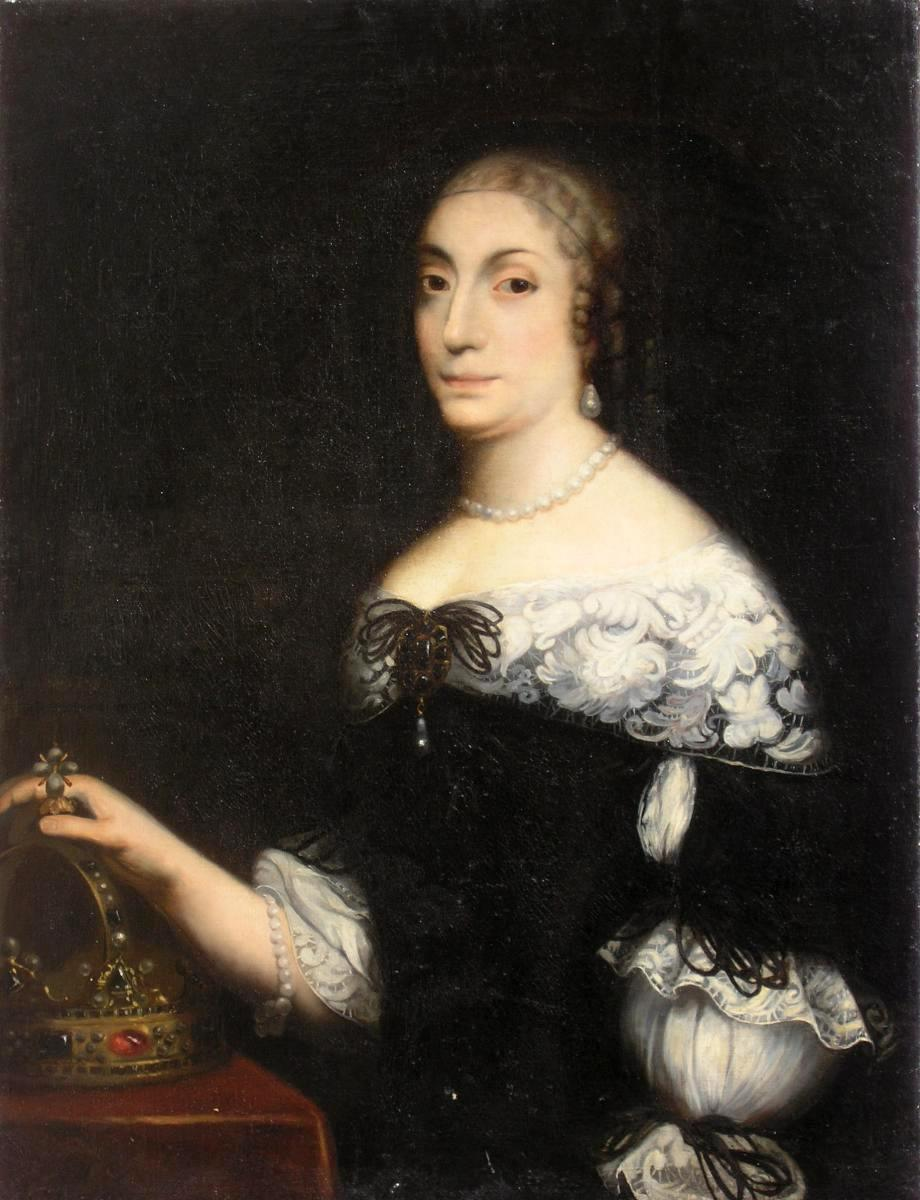 Portret królowej Ludwiki Marii Gonzagi według Daniela Schultza